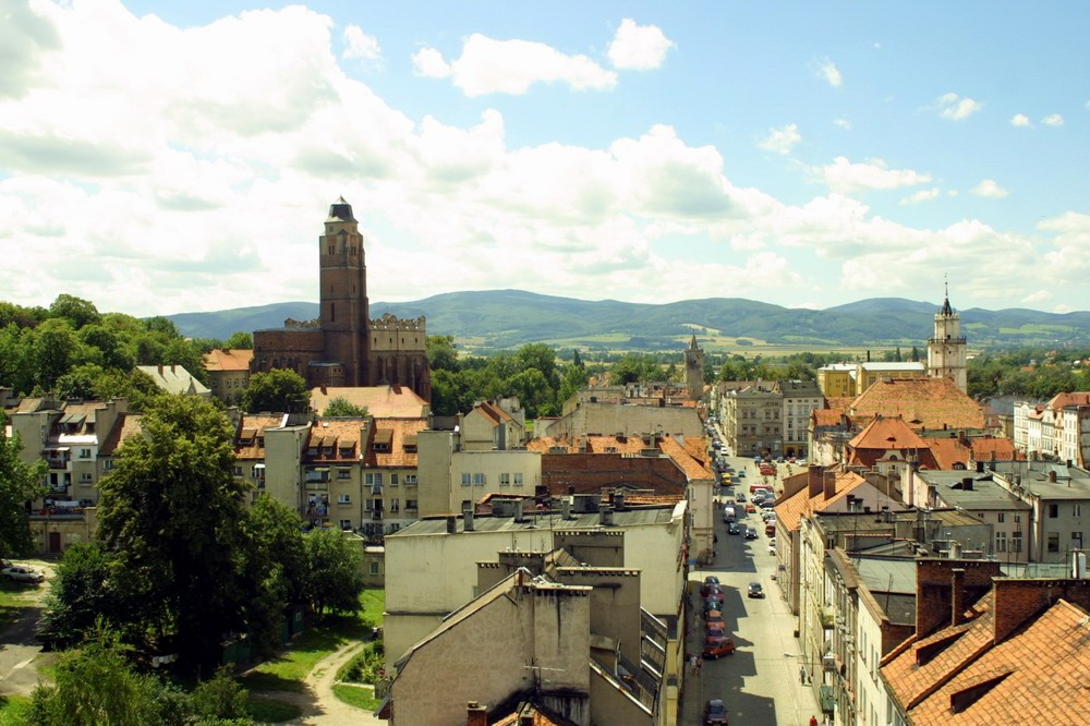 Paczków